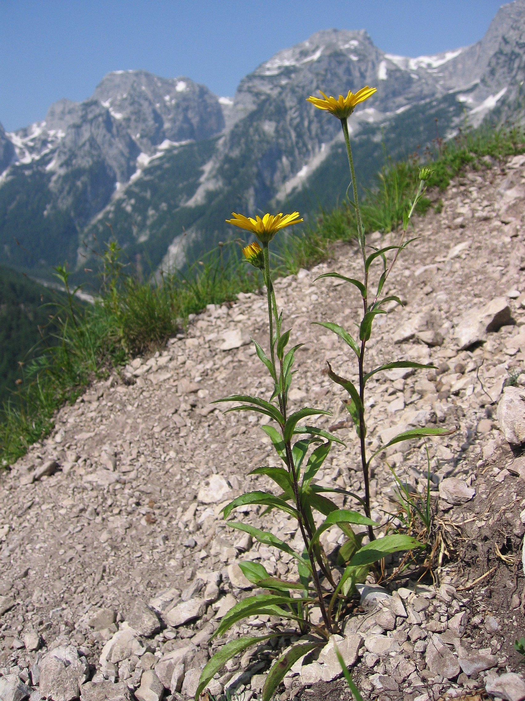 Buphthalmum salicifolium Hochstein, Upper Austria, Austria